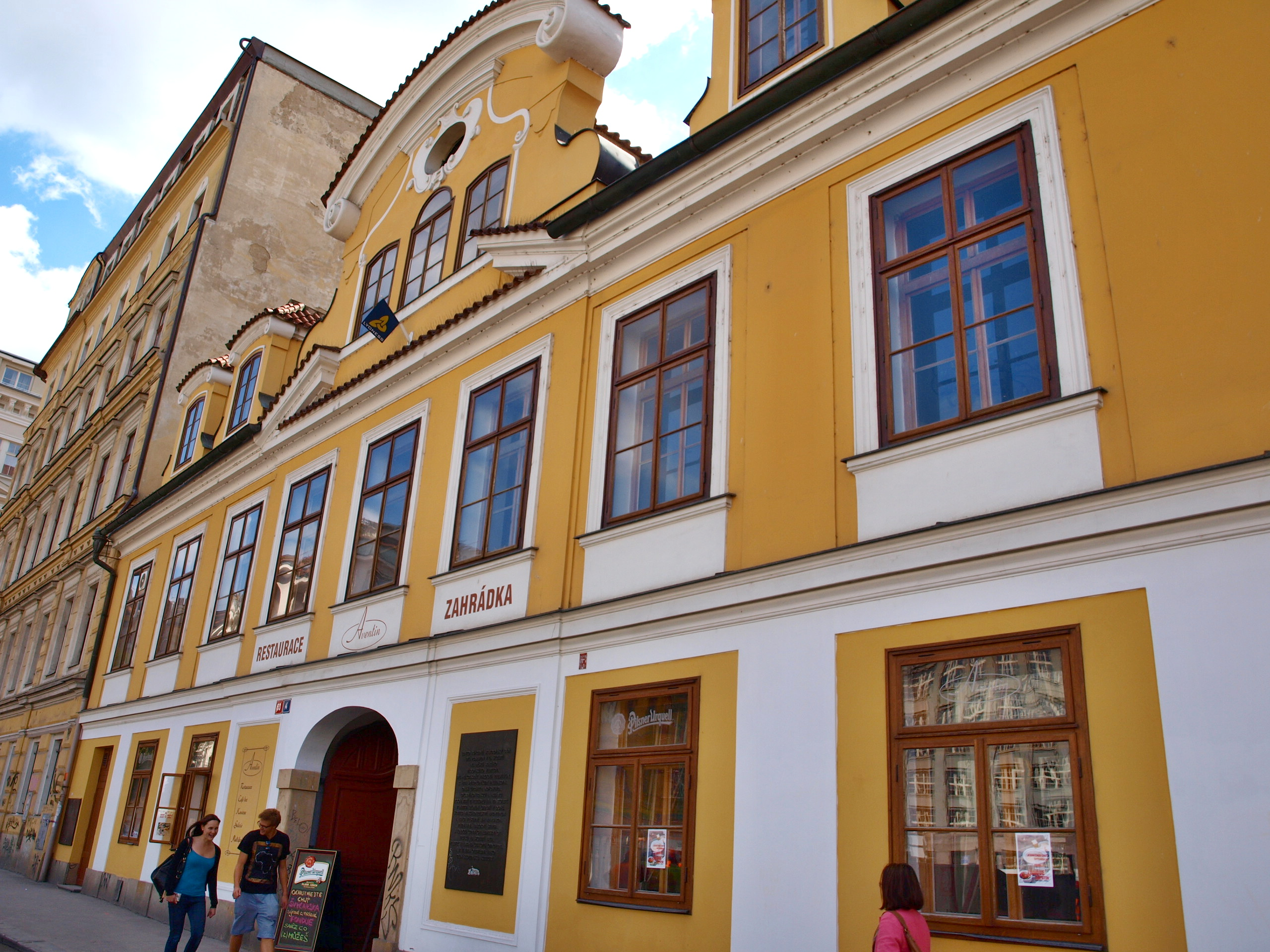 Palác Aventin, Praha-Nové Město